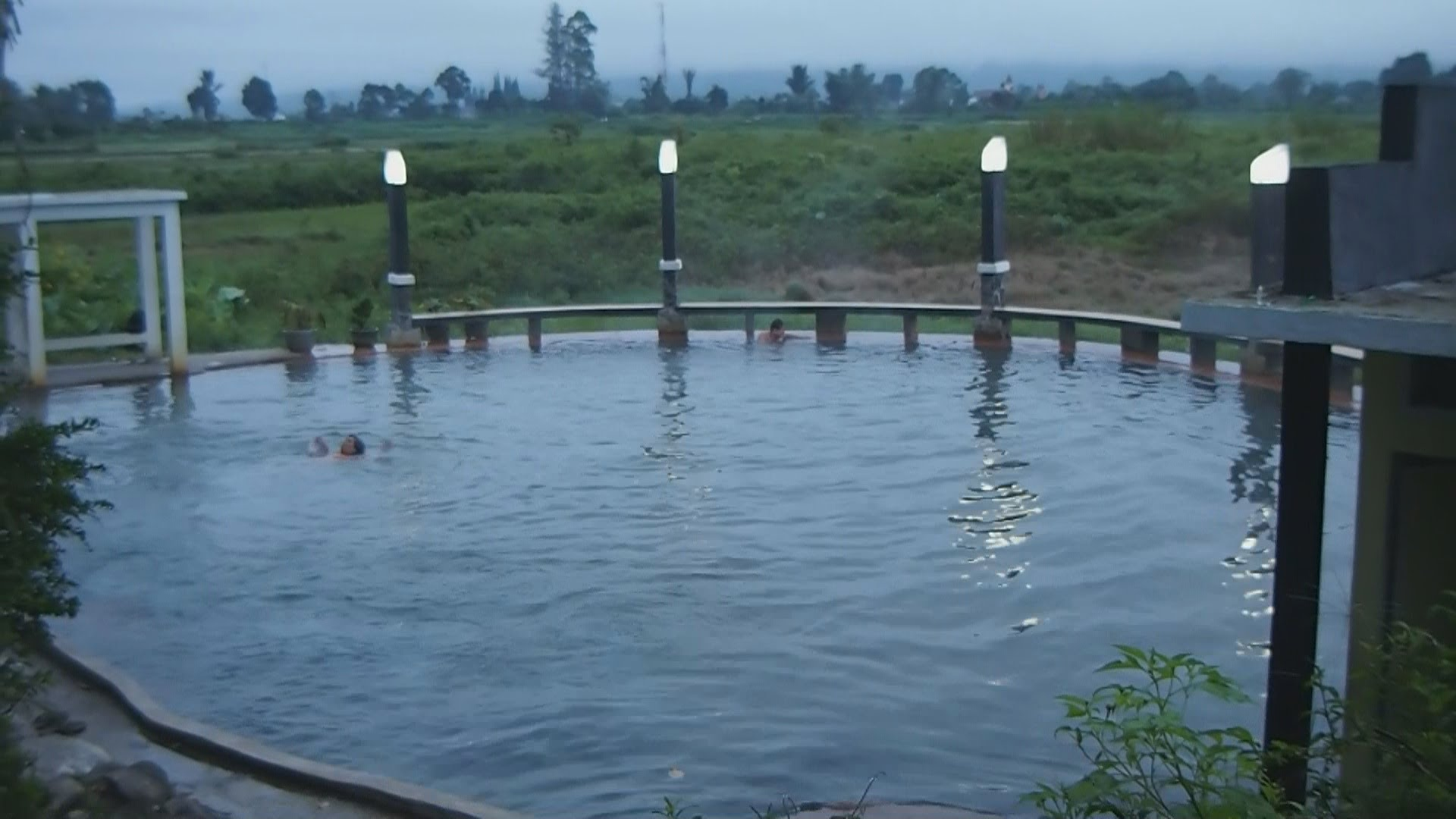 Pemandian Air Soda Tarutung 2015